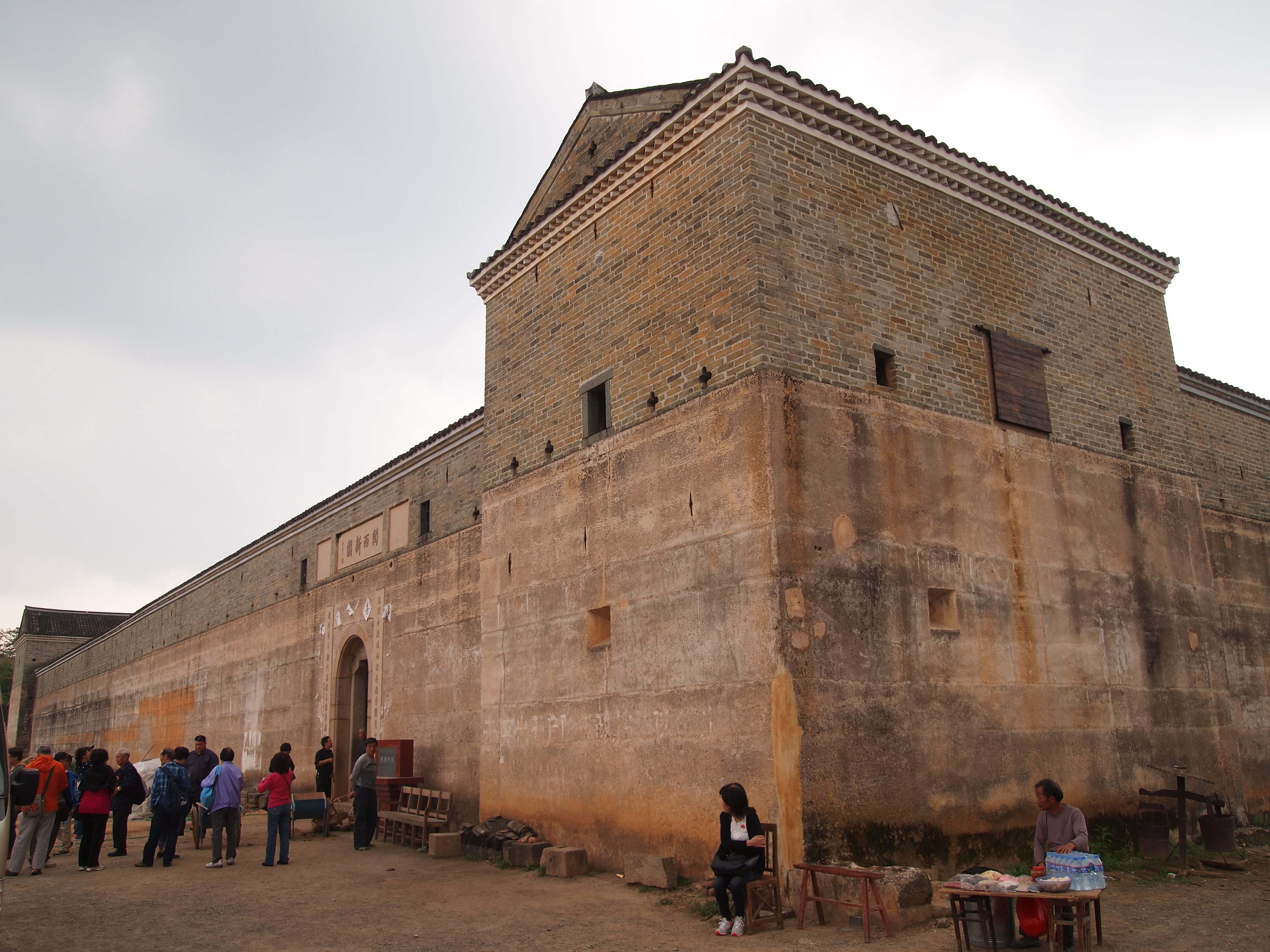 江西省龍南縣關西新圍